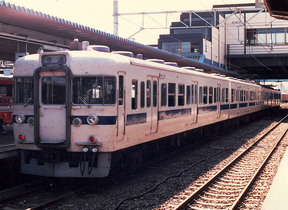 国鉄 401系 クハ401-17+モハ401-9＋モハ400-9＋クハ401-18